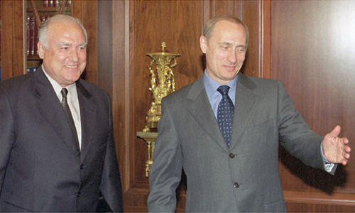 МОСКВА, КРЕМЛЬ. С послом России на Украине Виктором Черномырдиным.